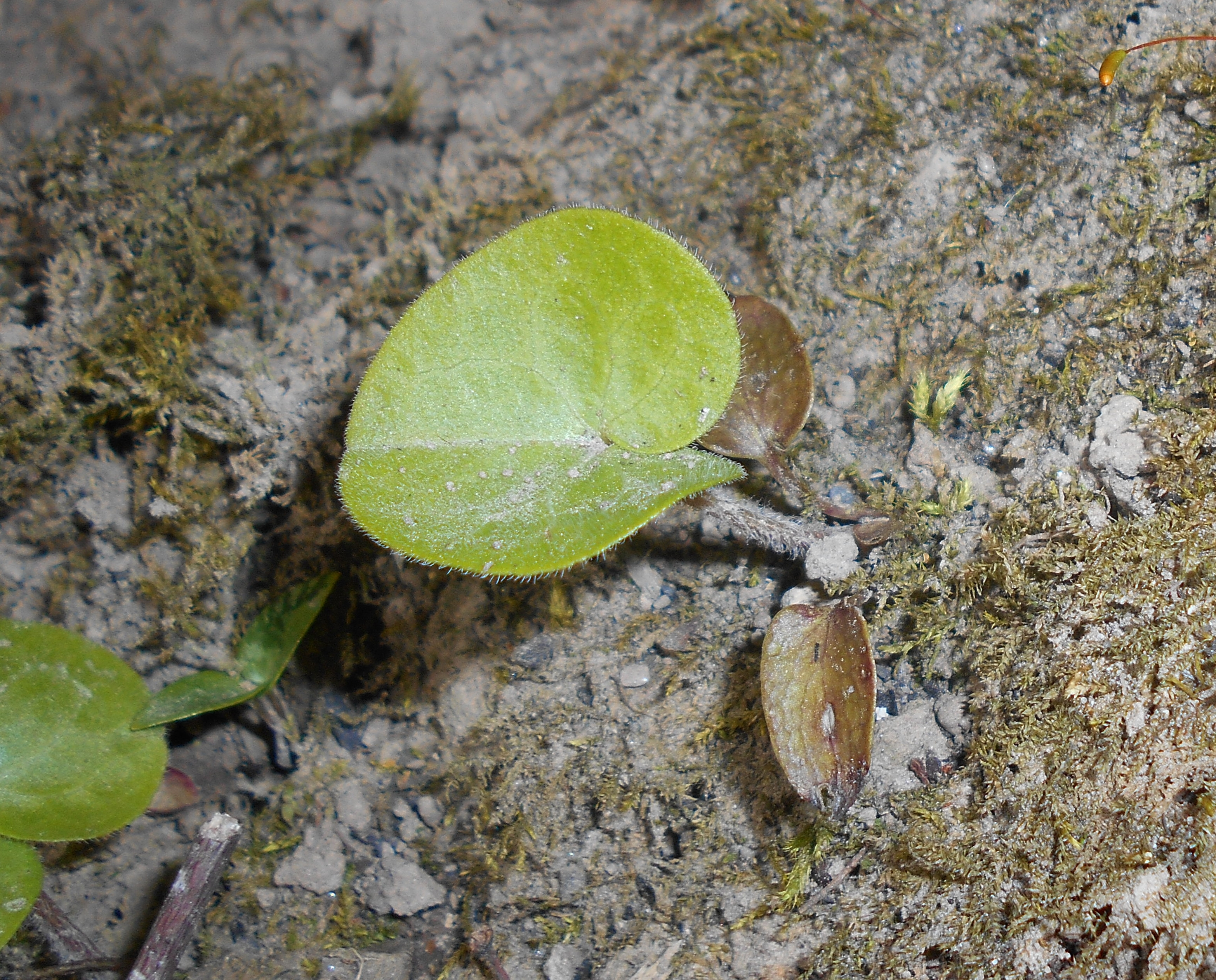 Kopytnik pospolity (Asarum europaeum) - siewka. Ogród Botaniczny UMCS w Lublinie.